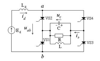 Однофазний мостовий паралельний інвентор